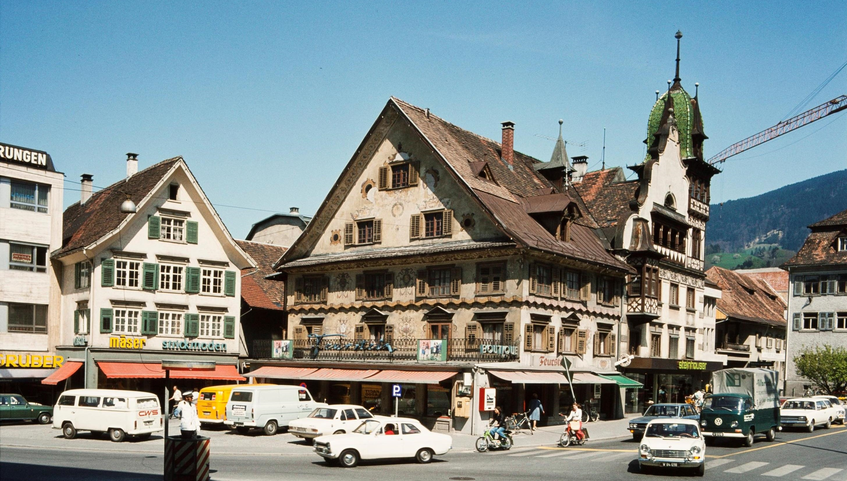 Blick auf den Dornbirner Marktplatz und das Feurstein-Haus im Jahr 1975. Gut erkennbar ist, dass zu diesem Zeitpunkt – und noch bis zum Jahr 1987 – die Hauptverkehrsader der Stadt über den Marktplatz führte und diese Kreuzung von einem Verkehrsposten geregelt wurde.